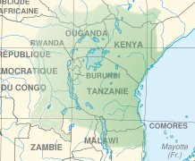 Zone swahiliphone, à partie de la carte d'Afrique Image:Africa map political-fr.svg Fabriqué avec Gimp. Licensing catégorie:Carte d'Afrique